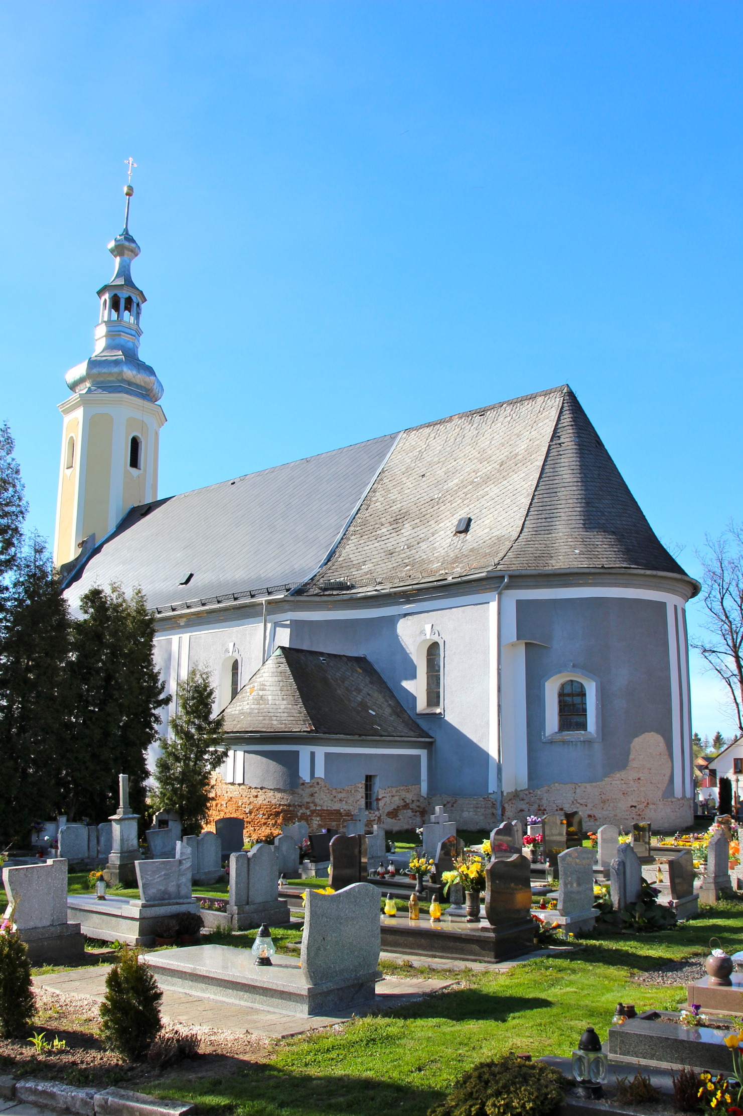 Kazimierz – wieś w Polsce położona w województwie opolskim, w powiecie prudnickim, w gminie Głogówek.